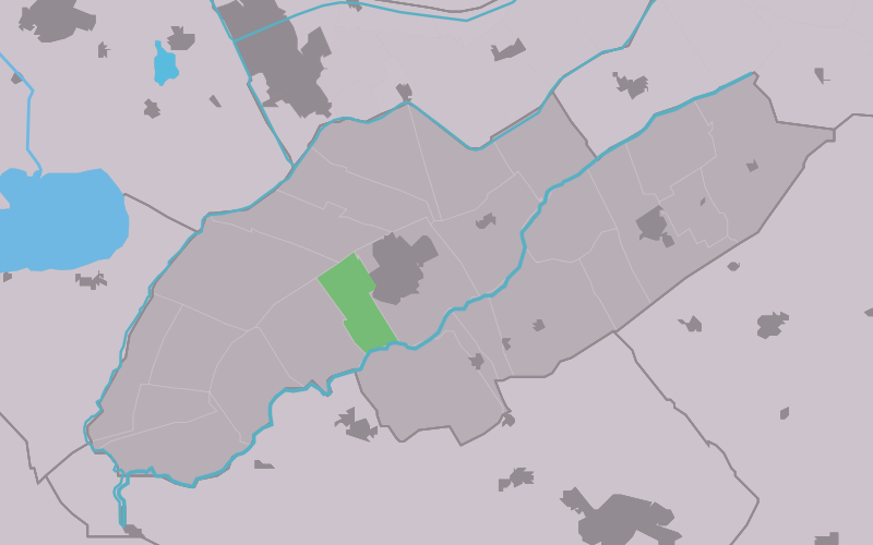 Kaartsje fan himrik fan Sonnegea